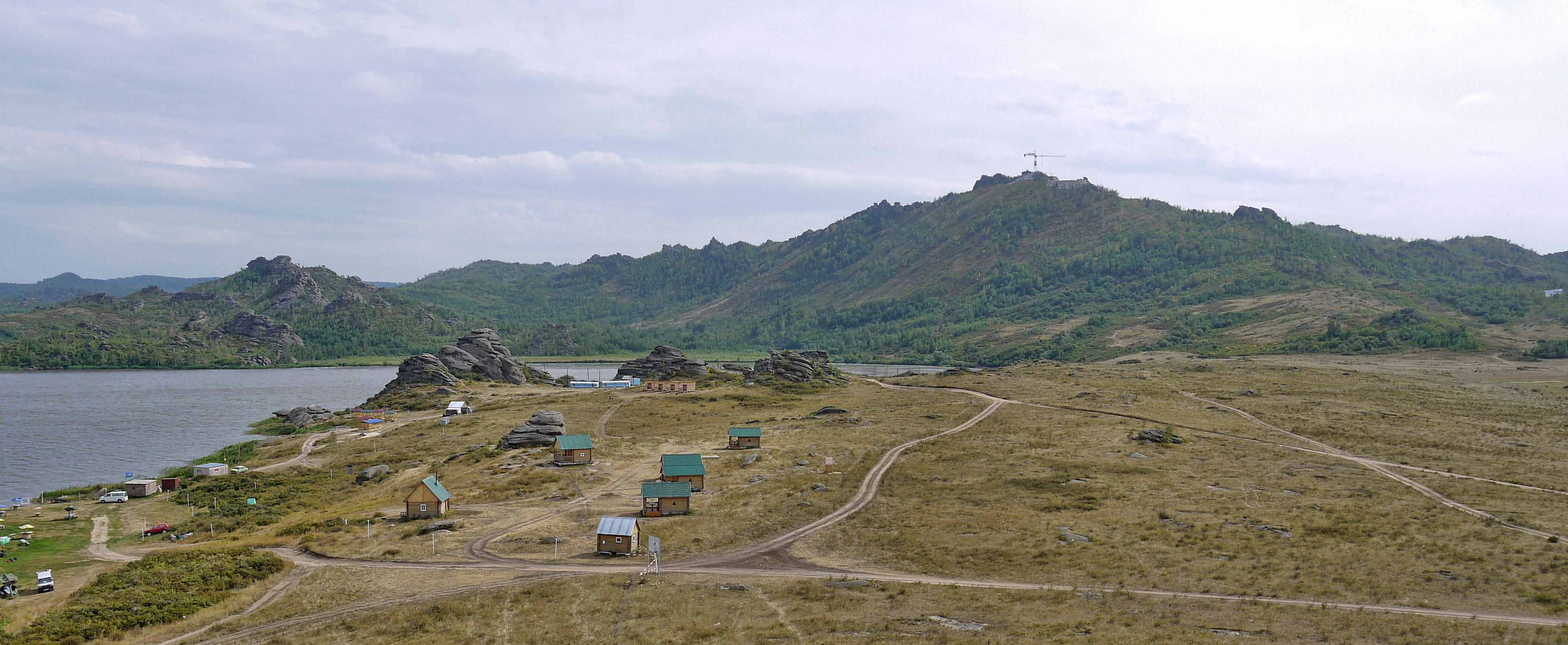 Горная Колывань: Змеиногорский район, Алтайский край This image is related to the protected area of Russia number 2200051